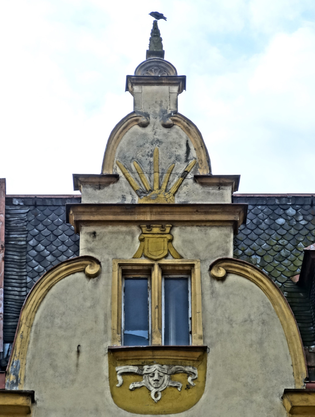 Kamienica przy ul. Długiej 74 w Bydgoszczy (1894)